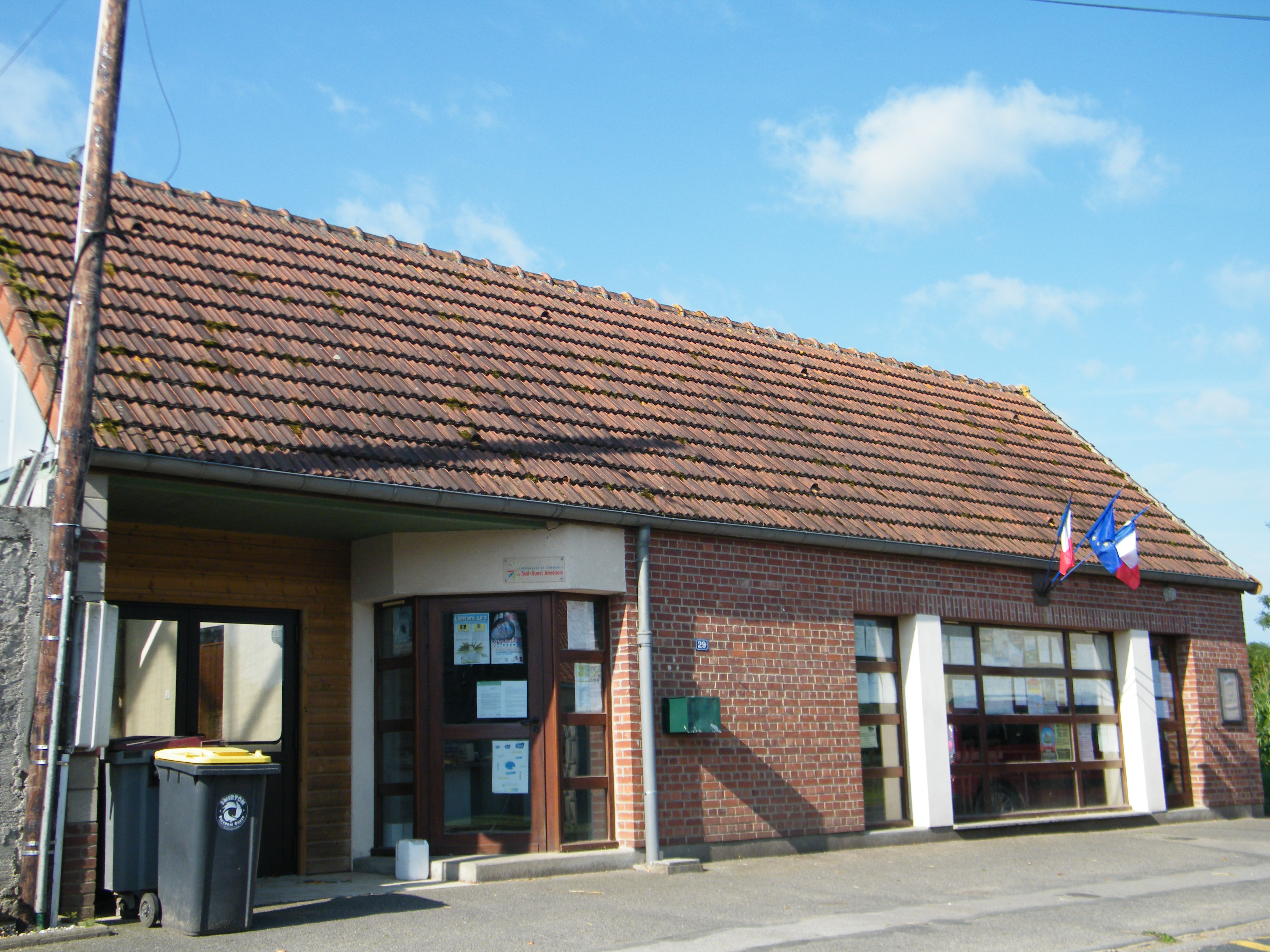 Mairie.